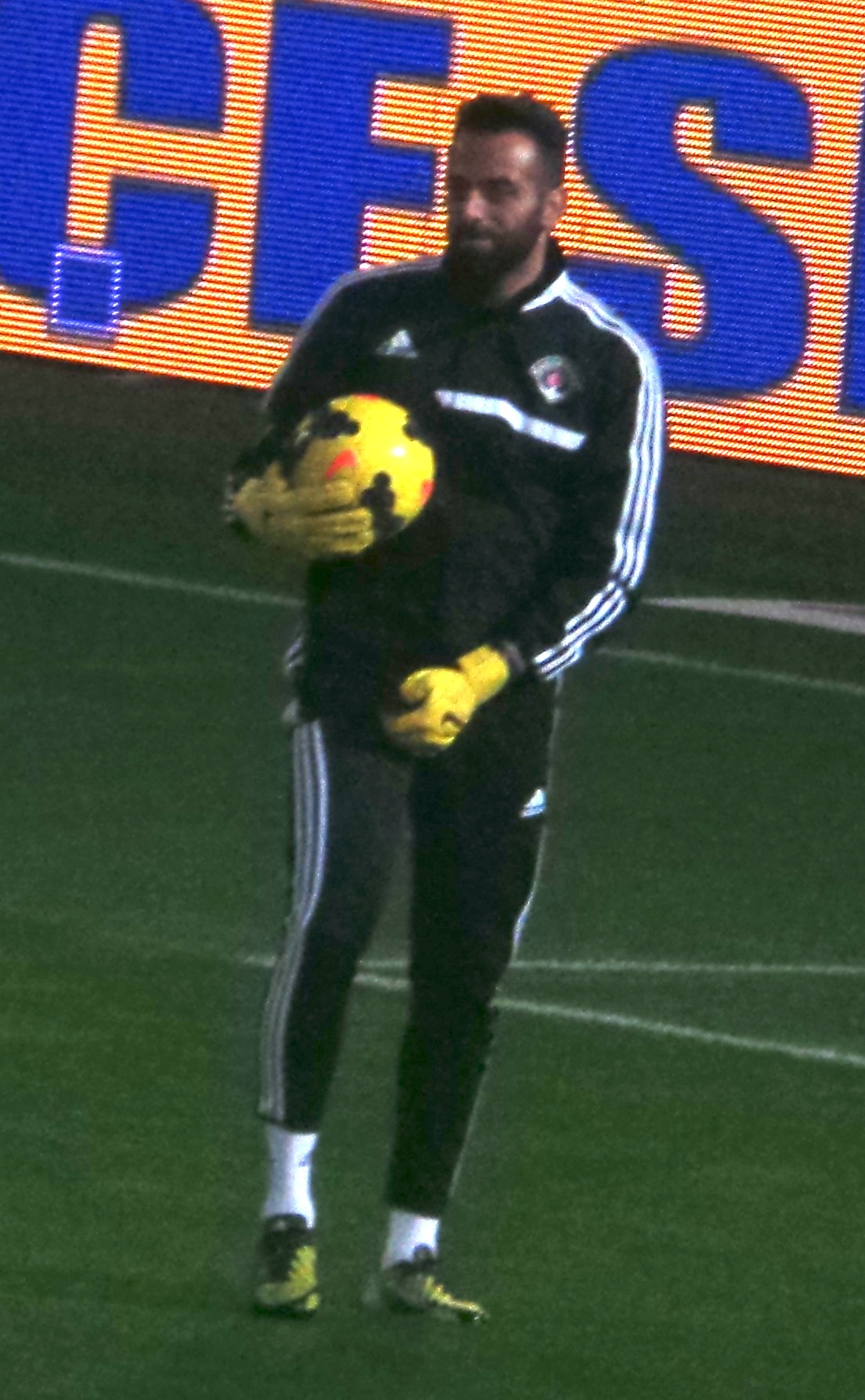 İlker Avcıbay